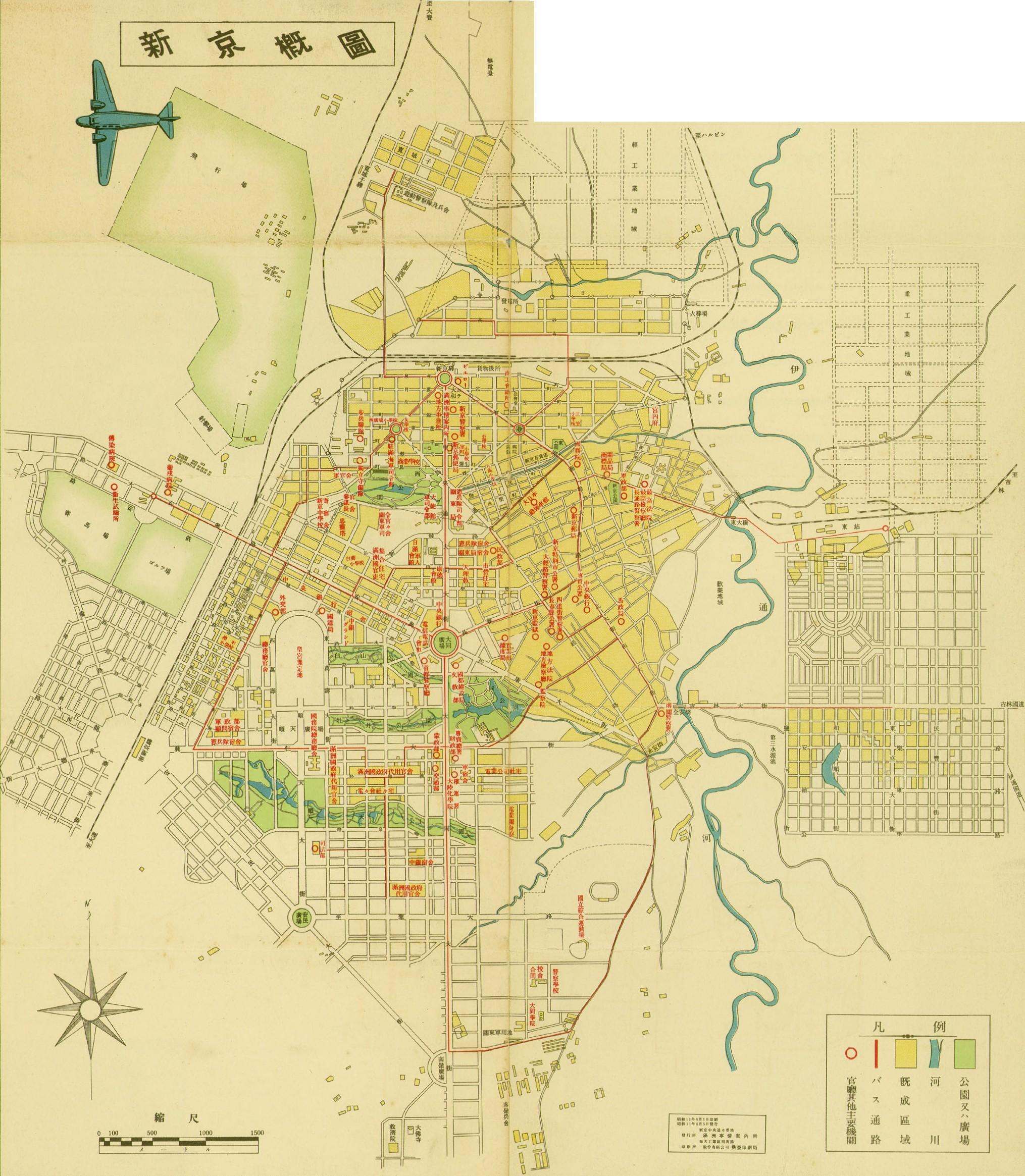 新京特別市・満洲事情案内所共編のパンフレット『新京概観』を加工。